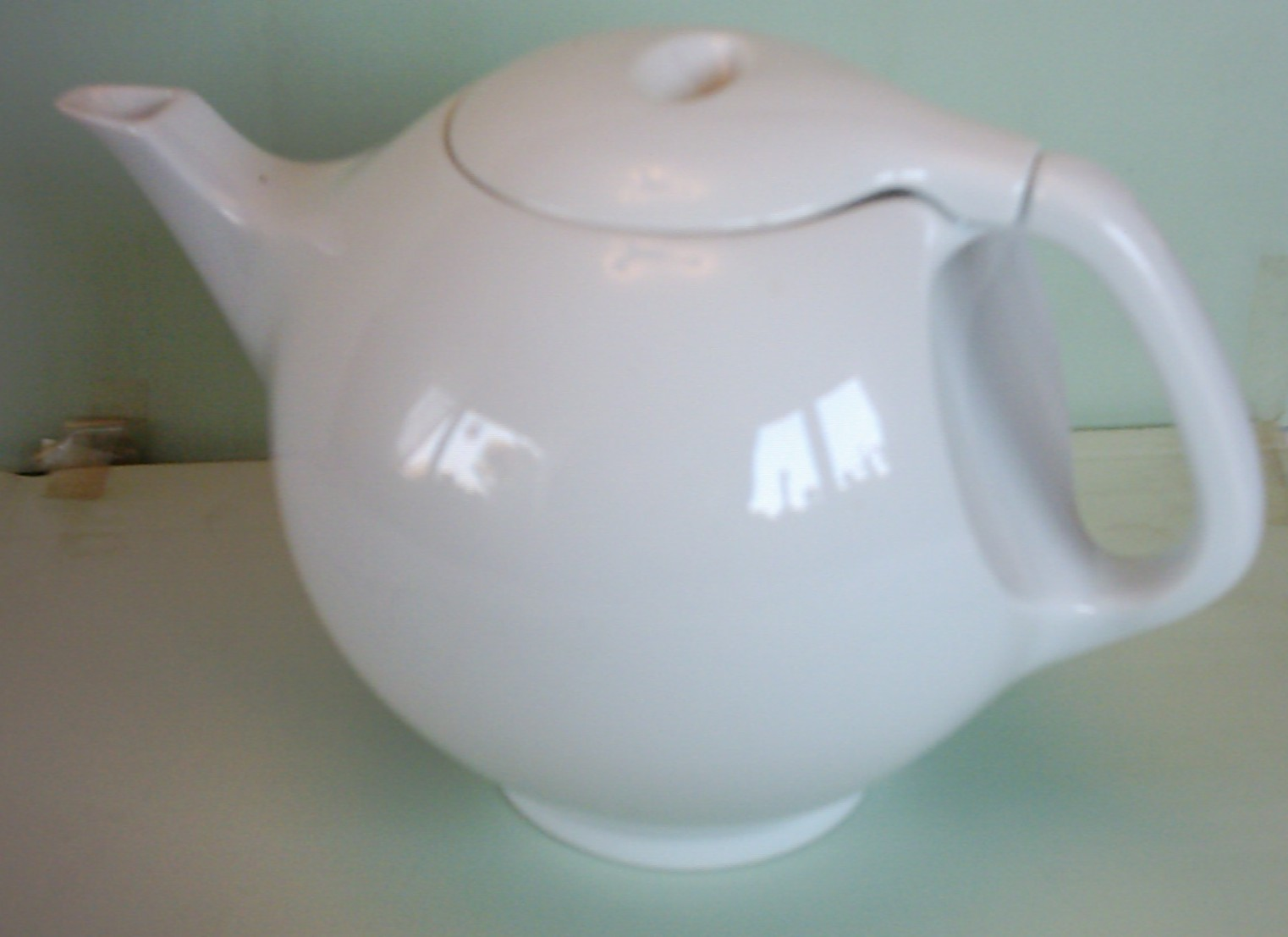 Teekanne der Manufaktur Fürstenberg, 1999 Fotograf: presse03, selbst erstellt, 04.03.2005 Lizenz: GNU-FDL